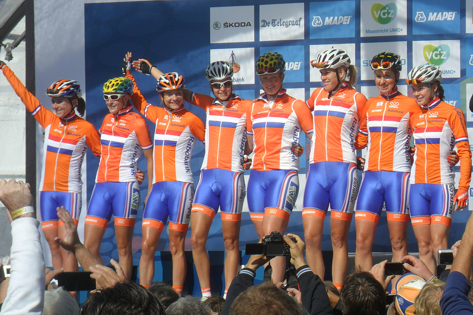 Ploegenpresentatie Nederland voor de start van het Wereldkampioenschap 2012 in Valkenburg, Nederland.